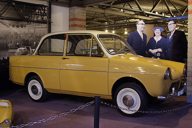 DAF 600 in het DAF museum, Eindhoven.